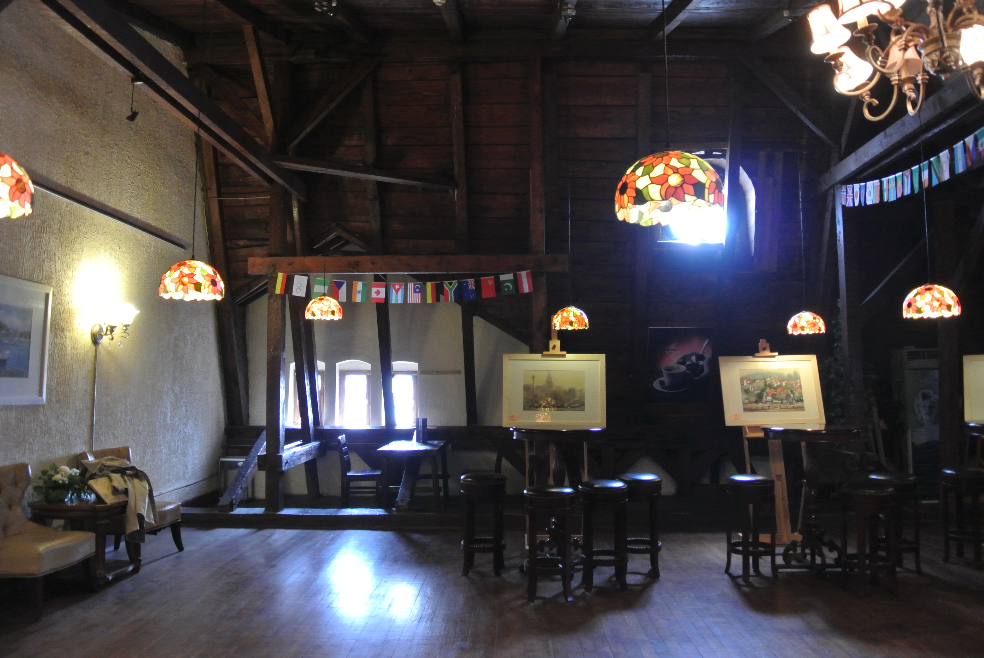 青岛邮电博物馆阁楼